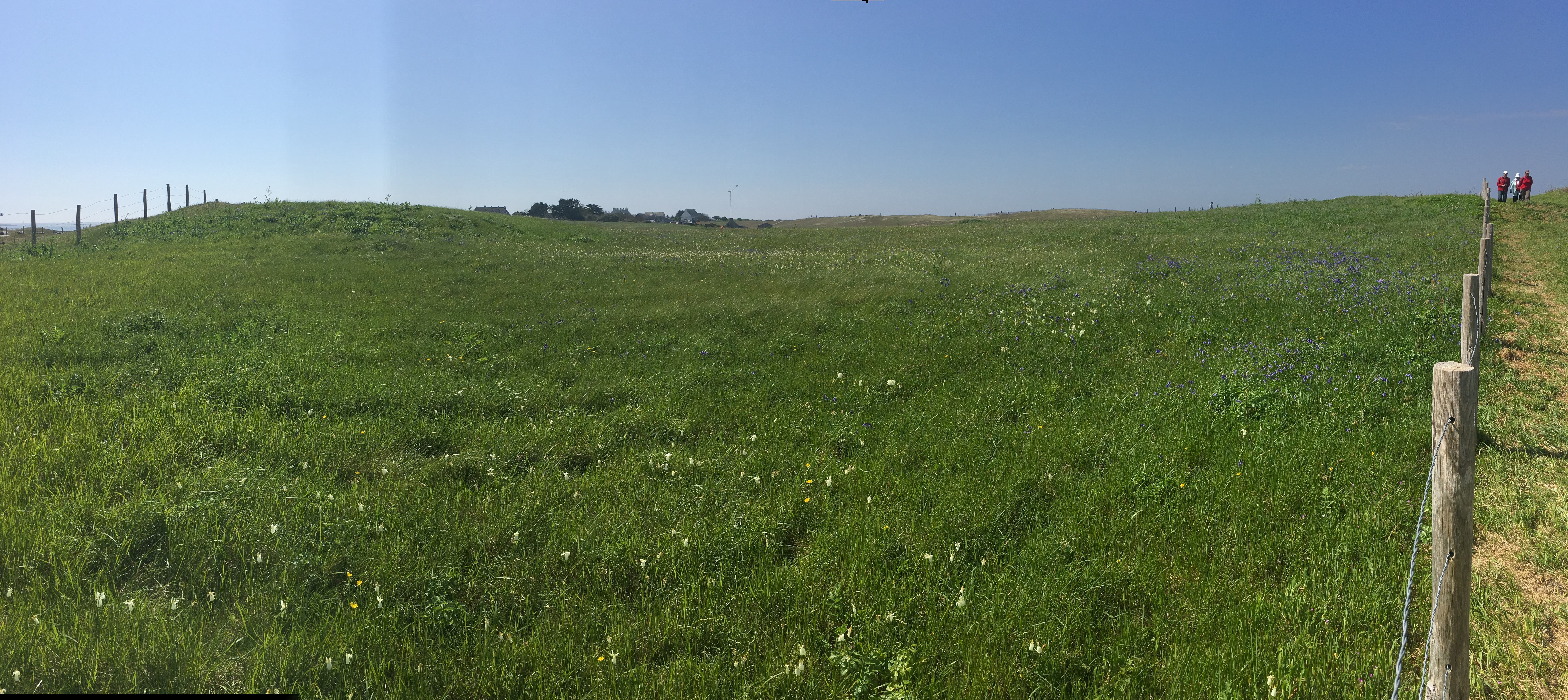 Vue du site où pousse le narcisse des Glenans